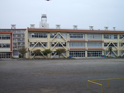 柏市立柏第七小学校校舎（南側）